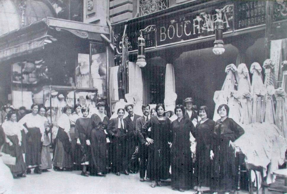 La boutique Bouchara à Marseille, berceau de la saga